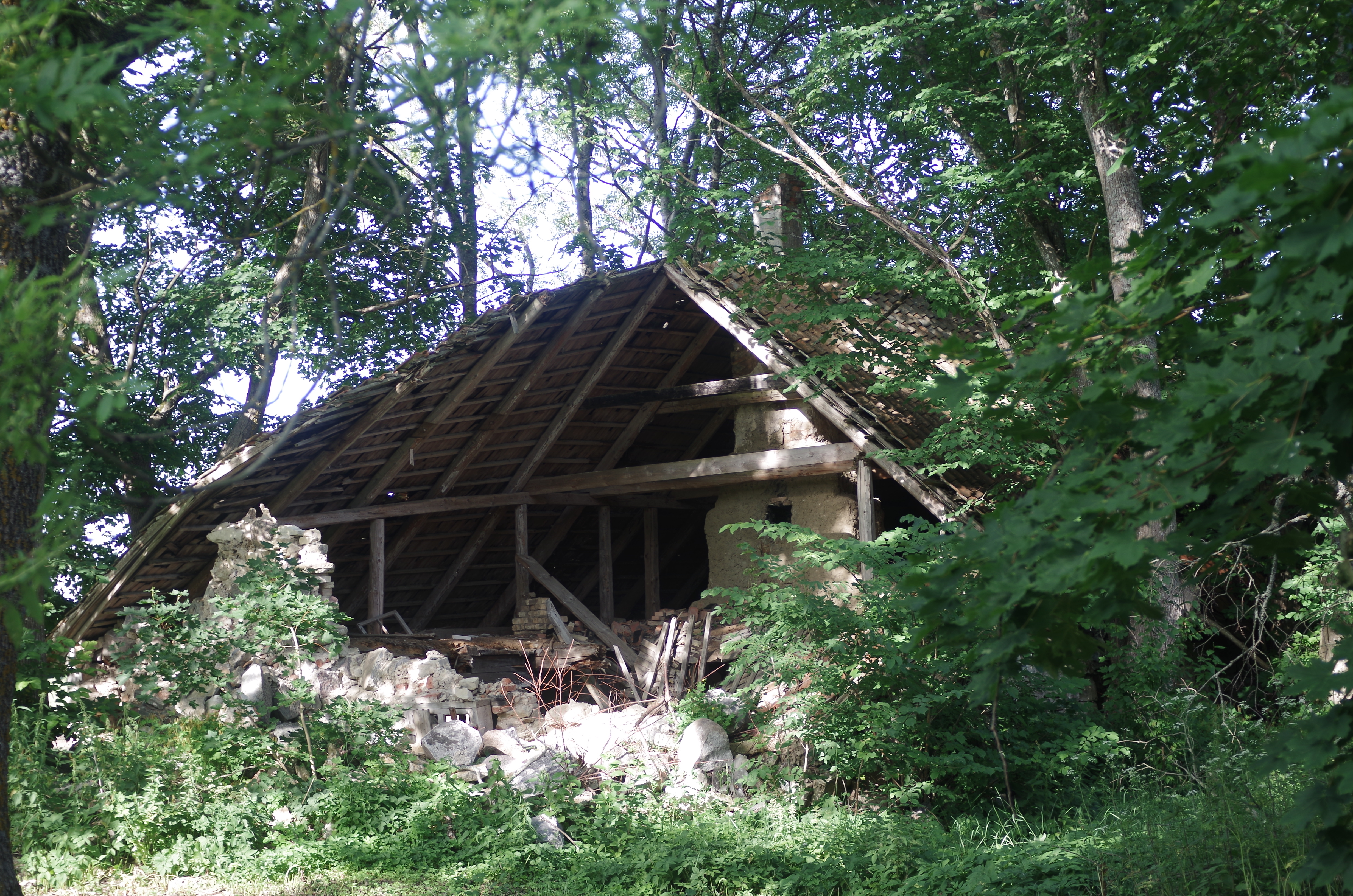 Pihtla mõis Saaremaal Pihtla vallas. (Foto: 2014)